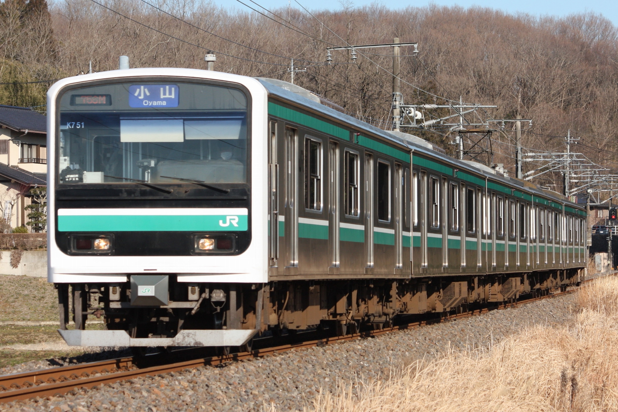 水戸線で運用されるE501系付属編成 笠間～宍戸にて